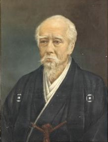 土佐宿毛領11代領主・伊賀氏理の肖像画。